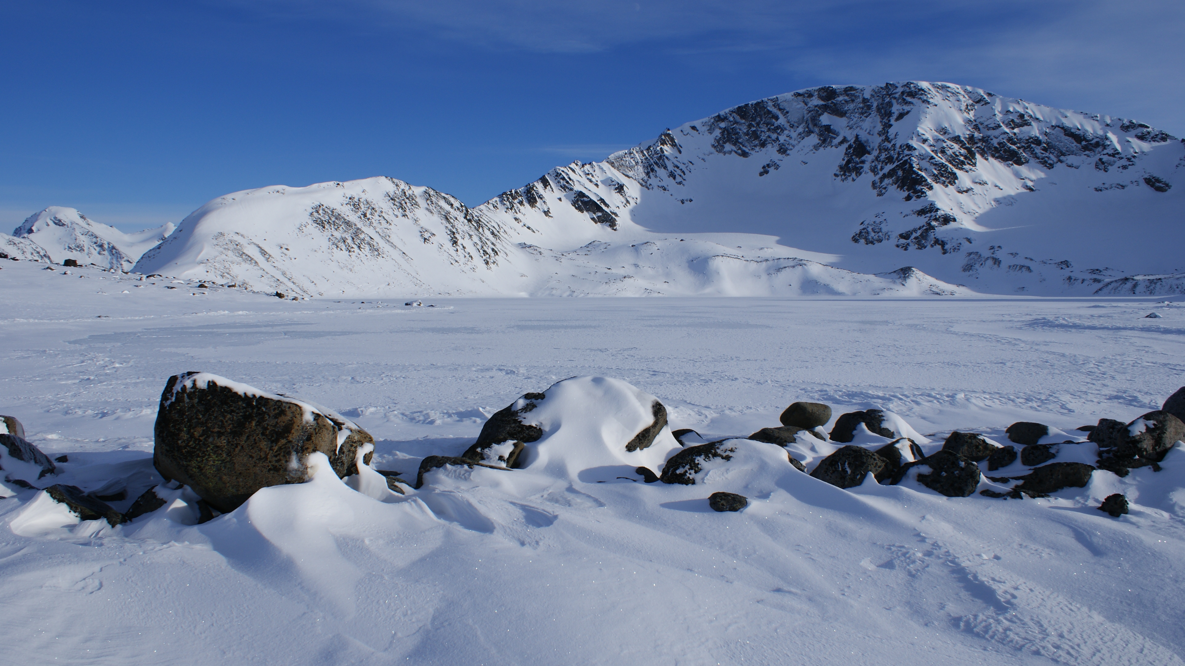 Frozen lake under Qalorujoorneq, 676m. Kulusuk, Greenland.